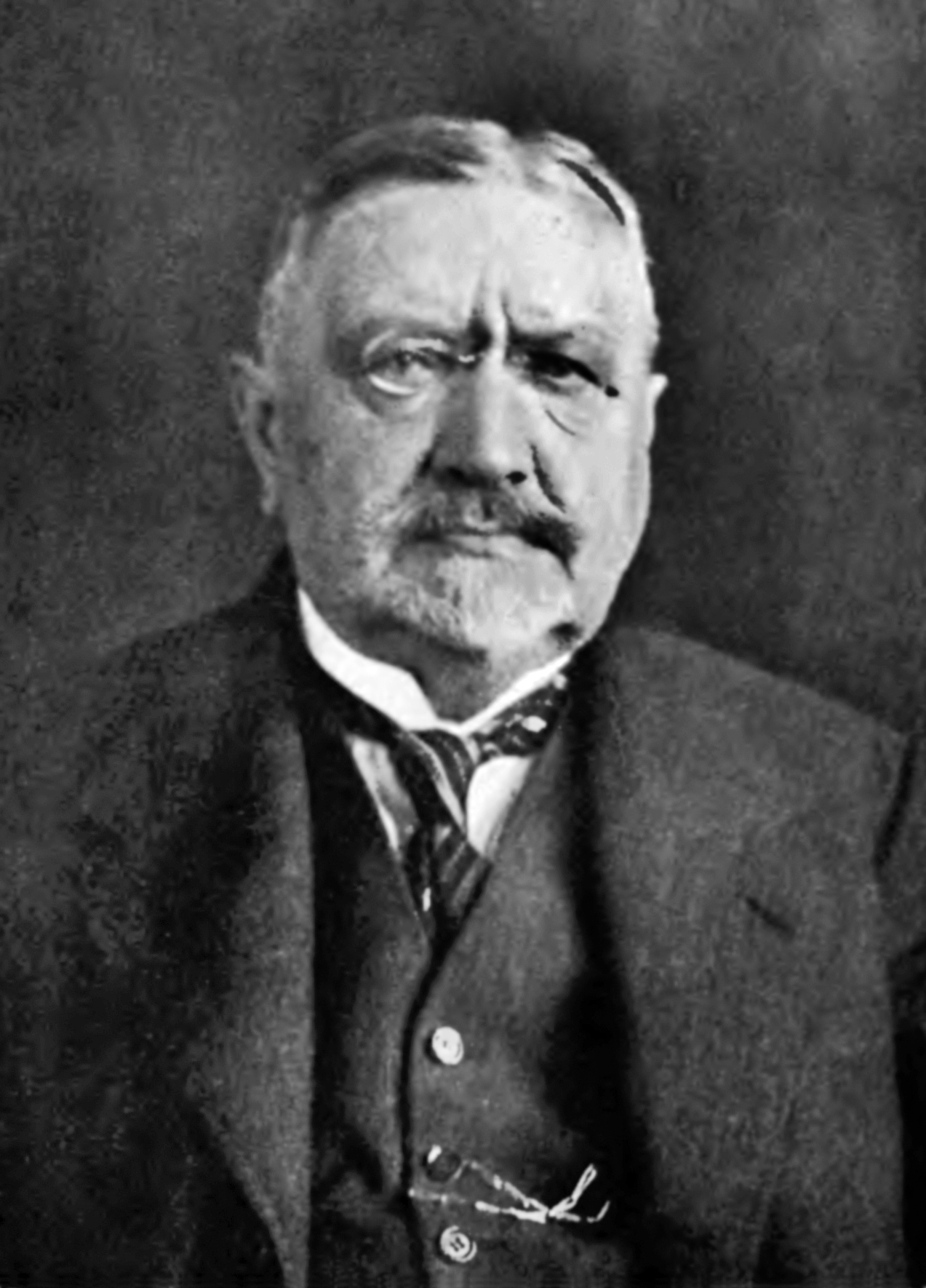 Władysław Henryk Franciszek Abraham (ur. 10 października 1860 w Samborze, zm. 15 października 1941 we Lwowie) – polski prawnik i uczony. Rektor Uniwersytetu Lwowskiego (od 1900), członek Polskiej Akademii Umiejętności (od 1893 r.), Towarzystwa Naukowego Warszawskiego oraz Towarzystwa Naukowego we Lwowie, Poznaniu i Wilnie. Zorganizował badania w archiwum watykańskim nad źródłami związanymi z Polską. Brał udział w komisji ministerialnej przygotowującej projekt konkordatu między Rzecząpospolitą Polską i Stolicą Apostolską, współtworzył polskie prawo małżeńskie.